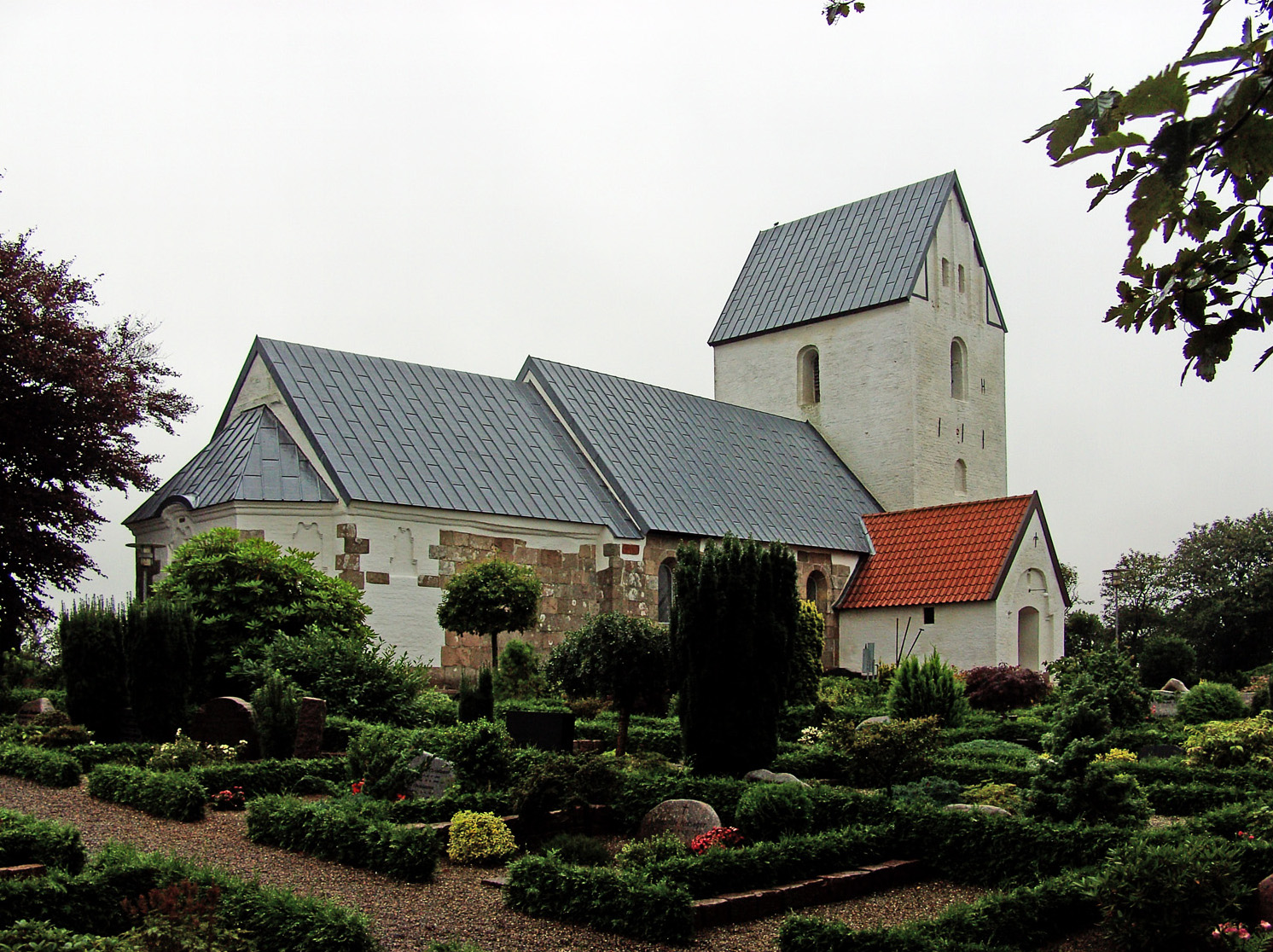 fra nordøst